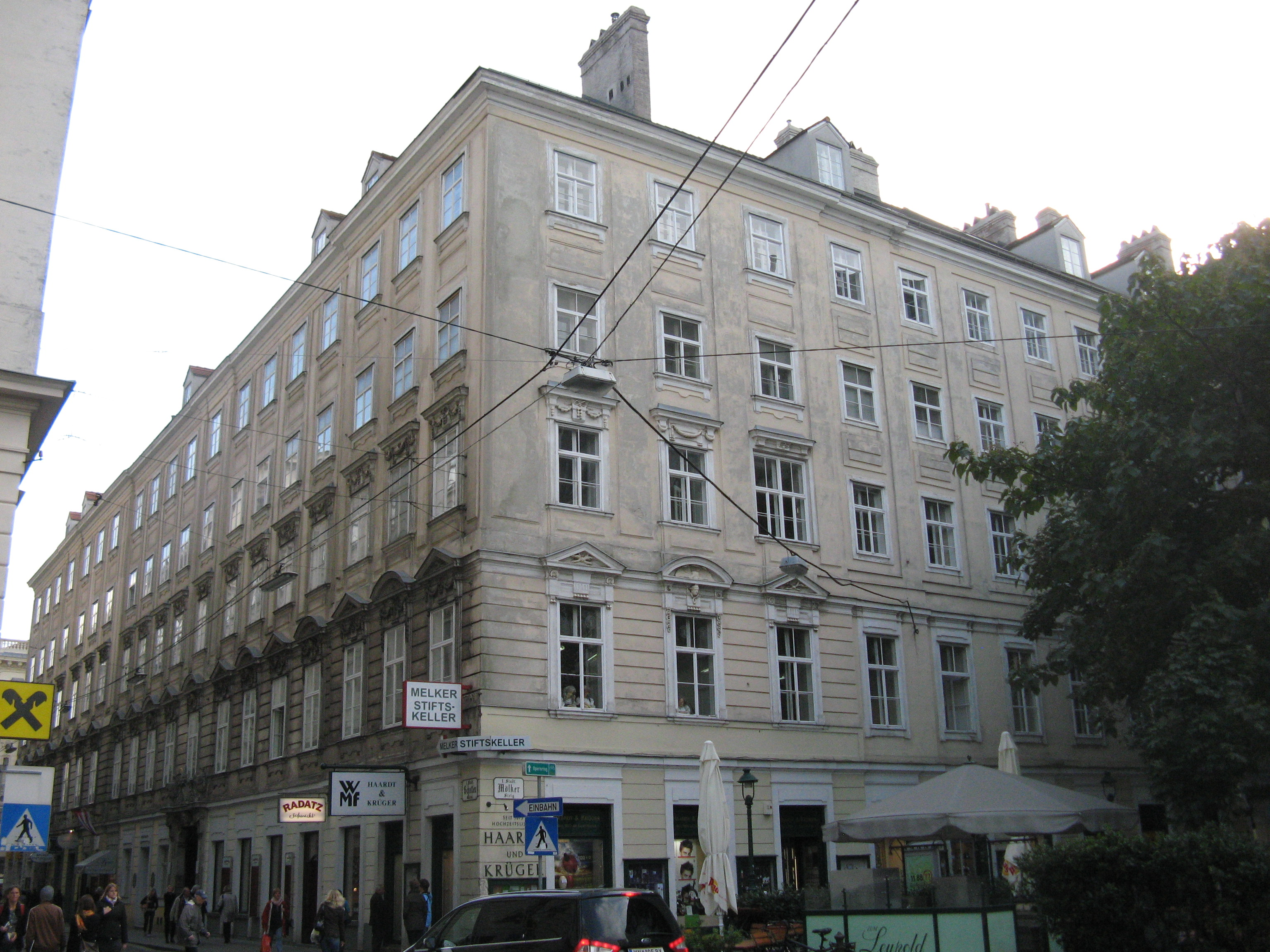 Melker Hof, Schottengasse 3-3a, Wien-Innere Stadt